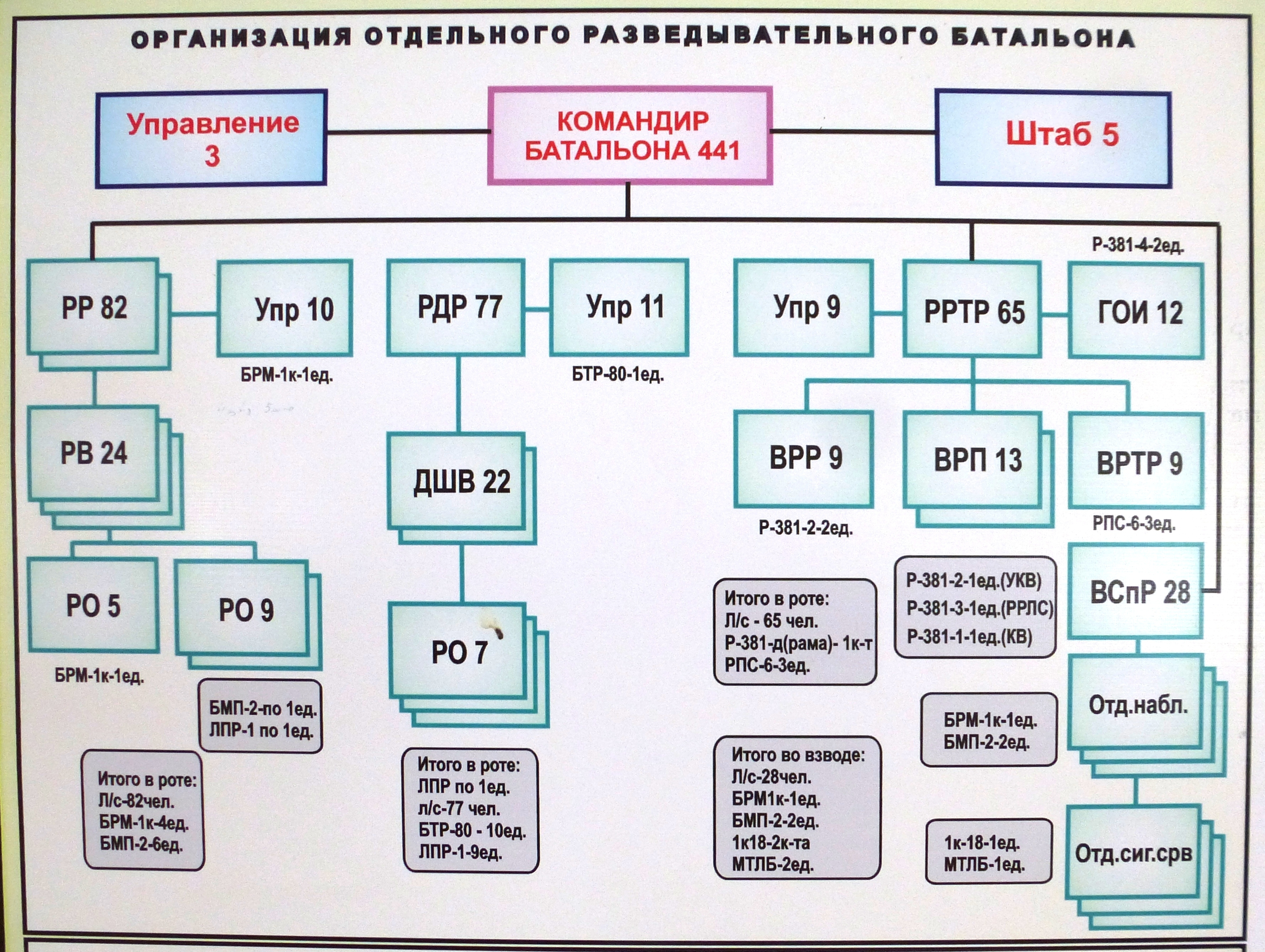 Организационно-штатная структура отдельного разведывательного батальона Вооружённых Сил Республики Казахстан. Плакат сфотографирован в Учебном Центре Военного Института Сухопутных Войск ВС РК. Примечание: Имеется графическая ошибка. Количество десантно-штурмовых взводов (ДШВ) указанное на схеме - 2 (два) вместо 3 (трёх).